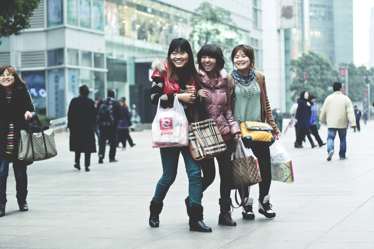 Tres mujeres chinas de compras.